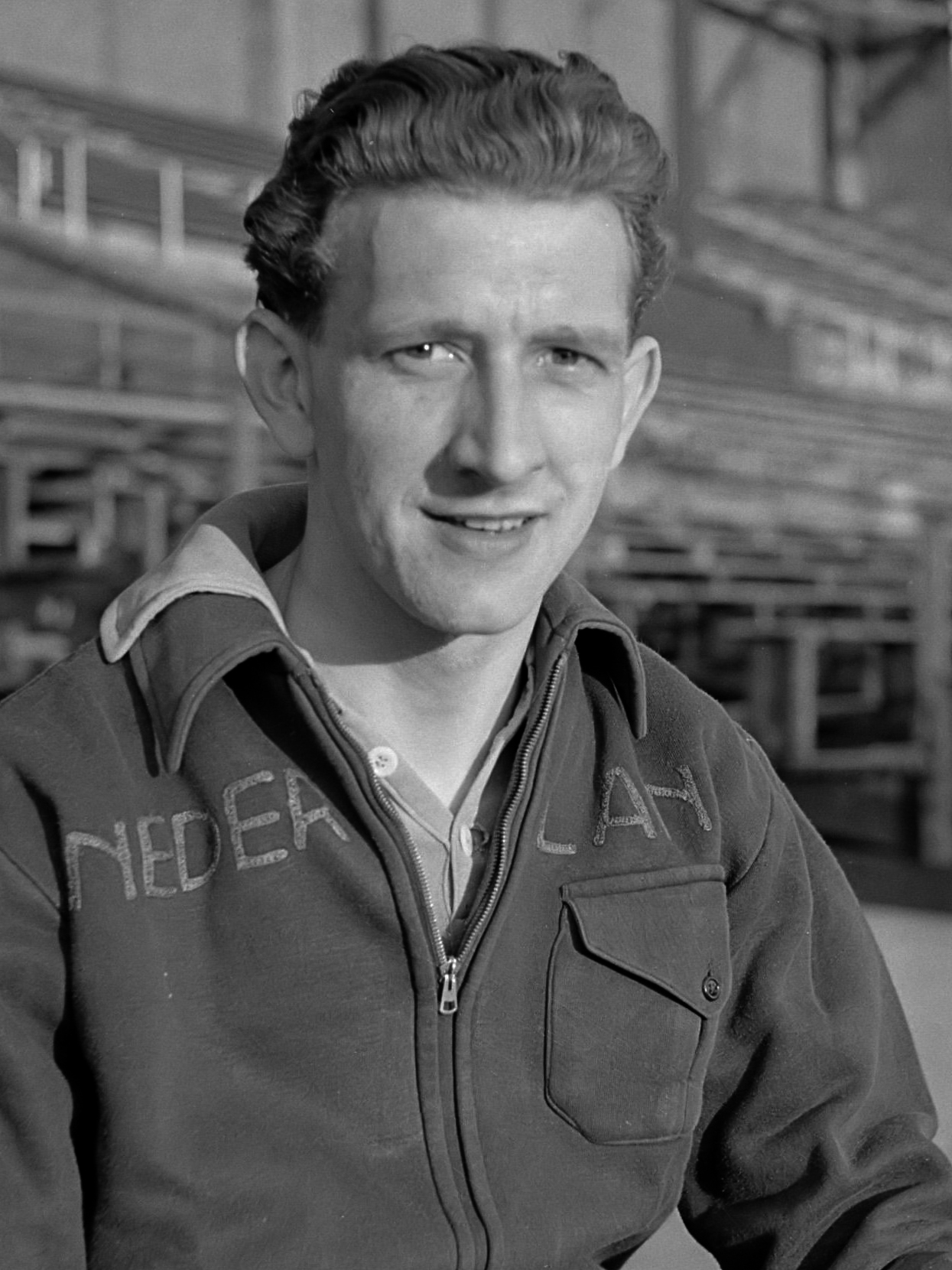 Nederlands voetbalelftal 1951. Noud van Melis (Eindhoven) in het Olympisch Stadion in Amsterdam, enige dagen na de oefeninterland tegen België 24 april 1951